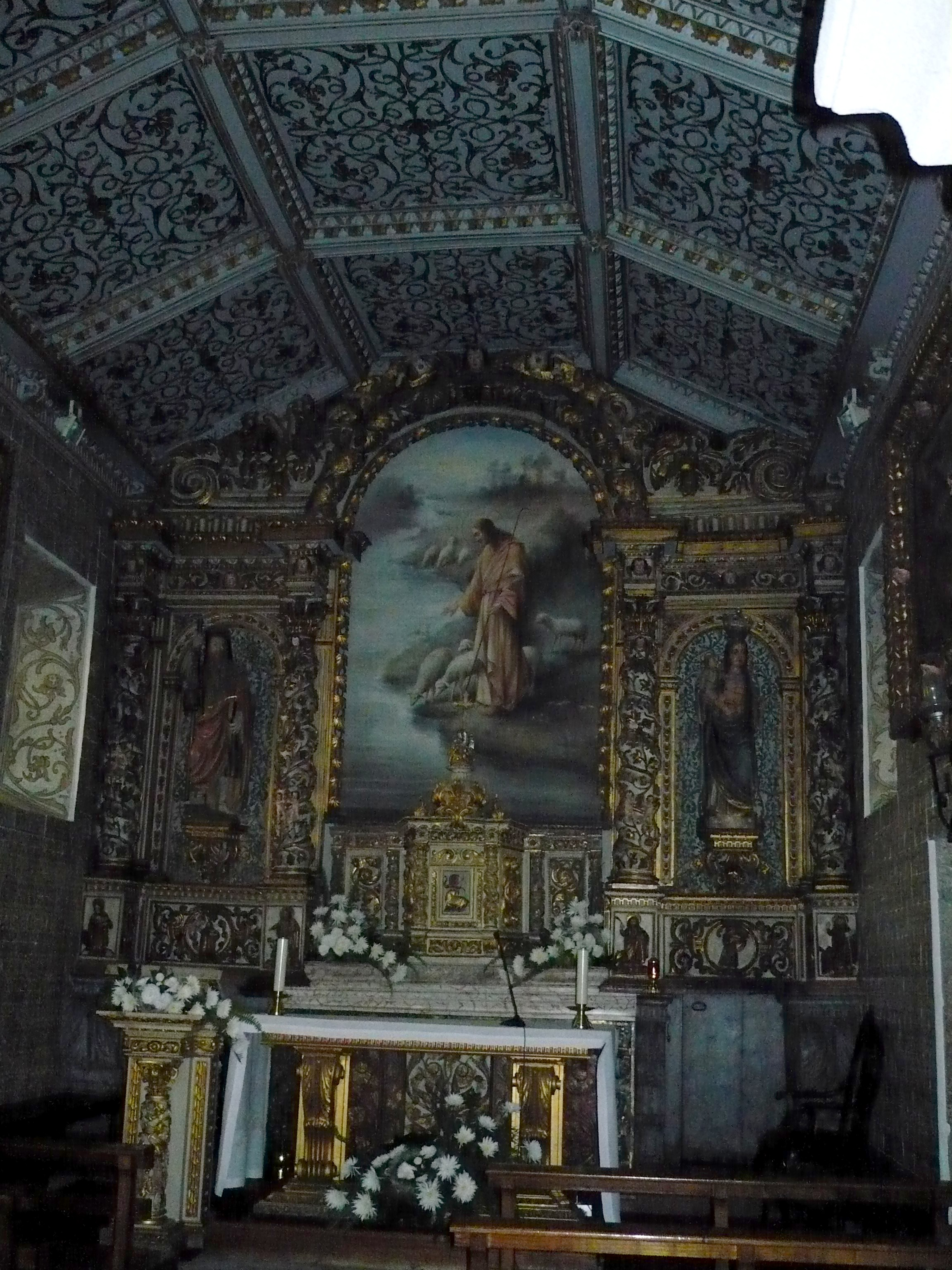 Interior (capela-mor) da Igreja de Santiago de Antas, Vila Nova de Famalicão